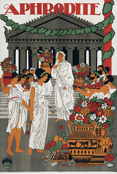 1918 nach einem Enwurf von Márton Tuszkay gedrucktes Vielfarb-Plakat in den Maßen circa 188 x 126 cm (Druck von Grafikai Intézet RT in Budapest) für den Film Aphrodite von Alfréd Deésy ...